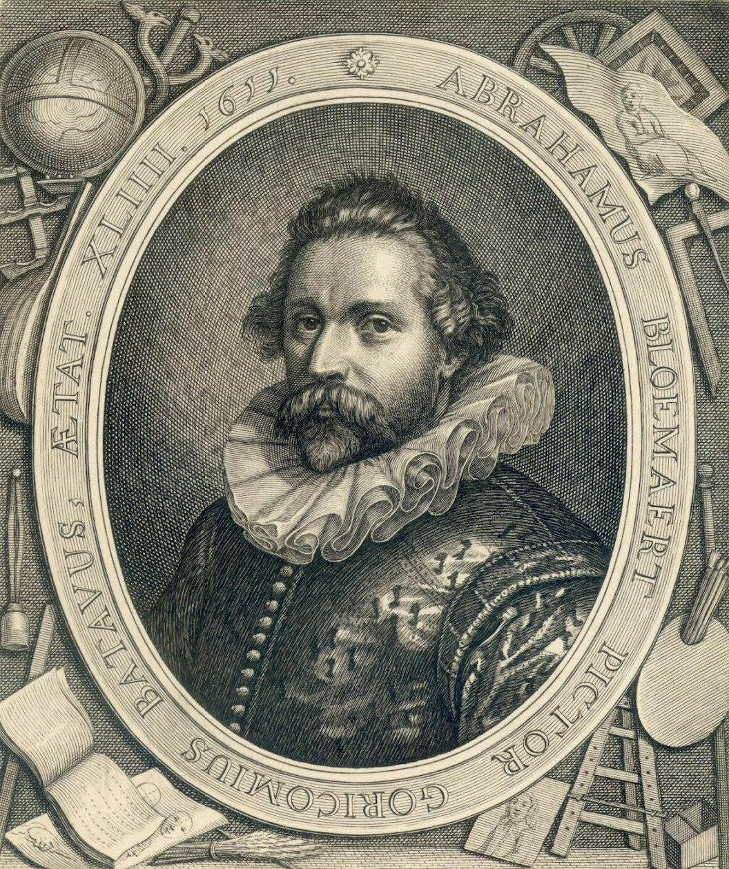 Abraham Bloemaert (1564-1651)